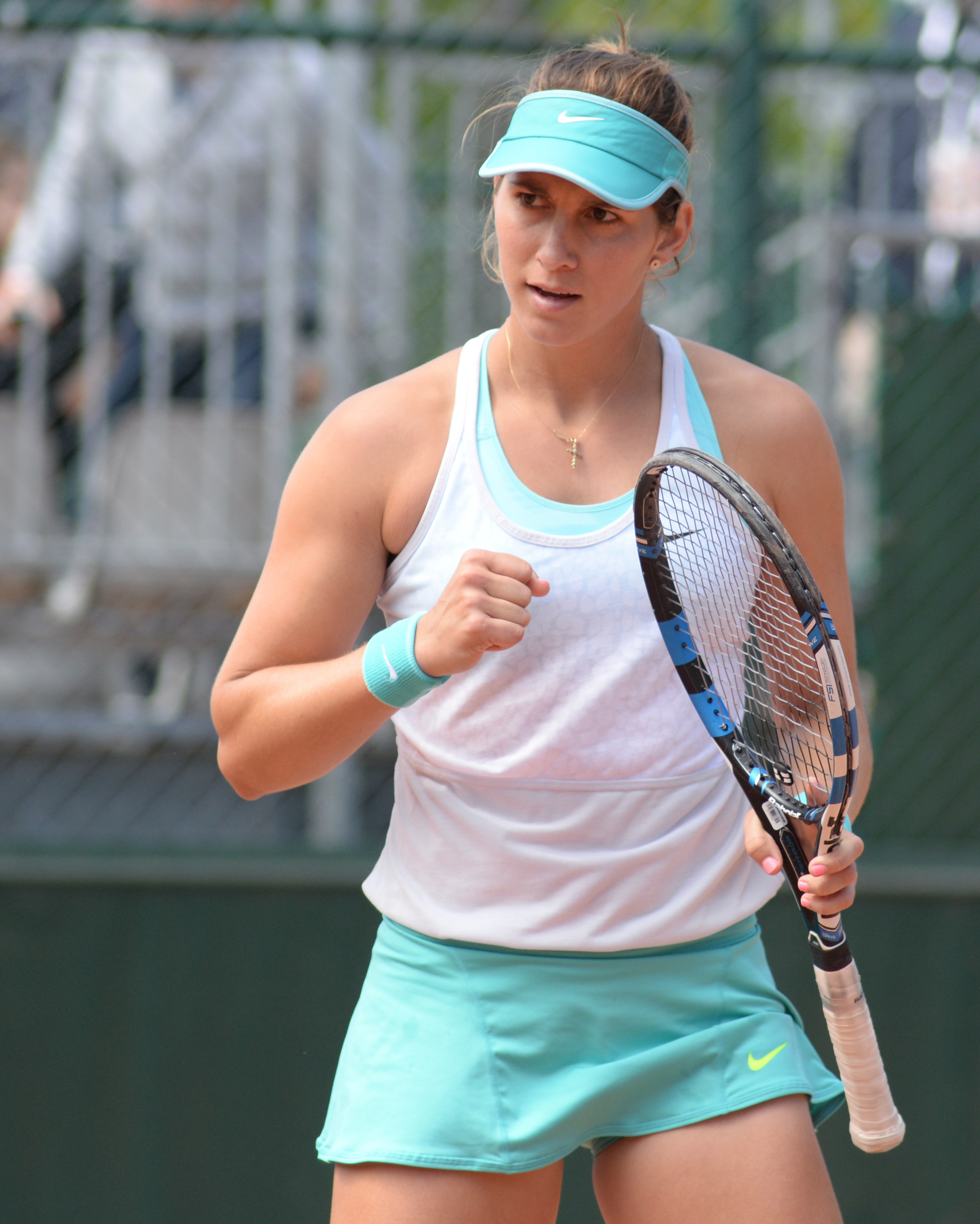 Maria Sanchez